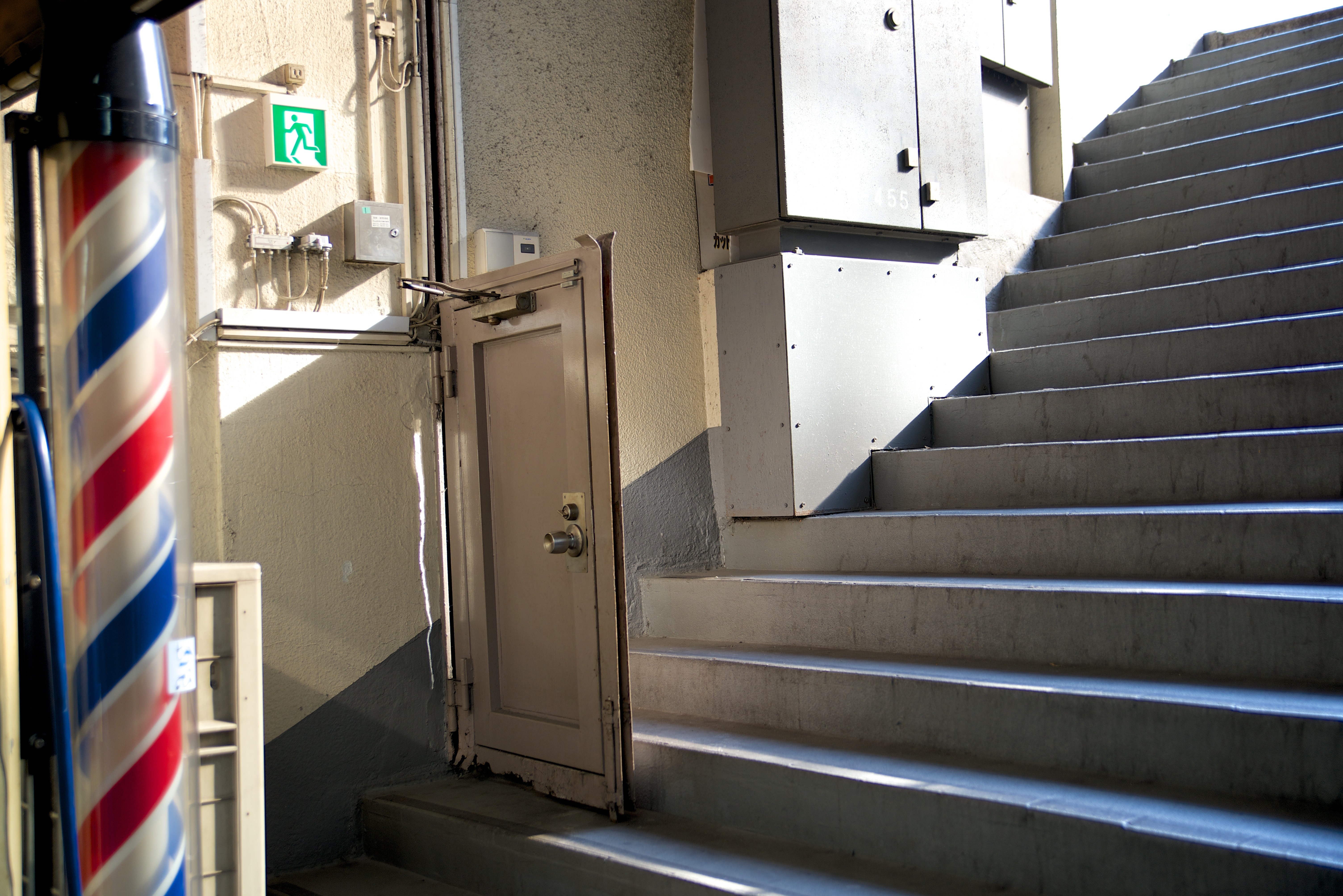 トマソン物件(無用ドア)っぽいが、まだ実用性の残っているものかもしれない。 三原橋地下街 [1]